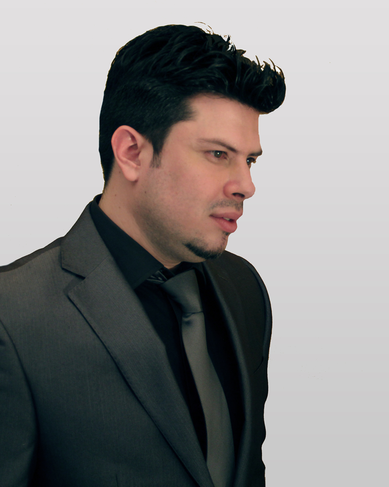 Director, Escritor y Productor Ejecutivo